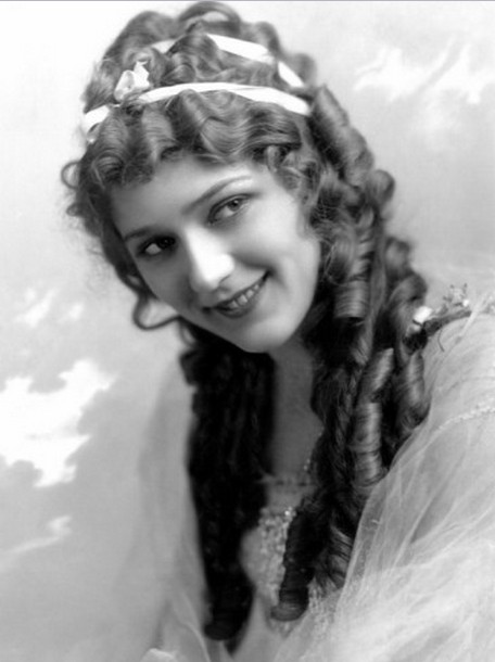 メアリー・ピックフォード。1918年に撮影